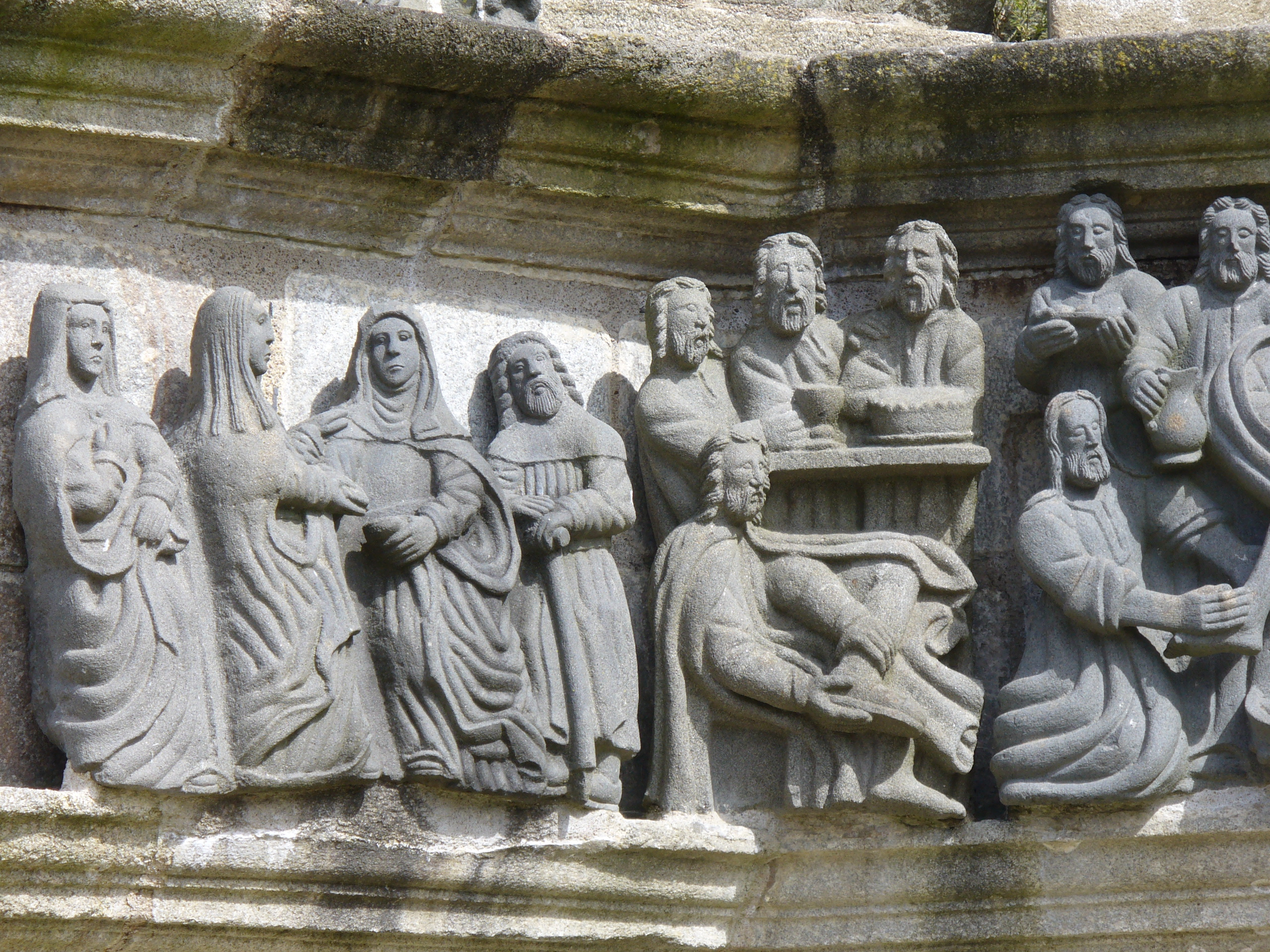 Links-La Visitation-Besuch-Elisabeth begrüßt mit einer freundschaftlichen Geste Maria und Maria reicht ihr einen Becher-Dahinter Joseph stehend.-Rechts-Le Lavement des pieds-Fußwaschung Jesus wäscht Petrus und seinen Jüngern die Füße Calvaire-Kalvarienberg-Guimiliau-Saint Miliau(1600)-Enclos Paroissal-Umfriedeter Pfarrbezirk